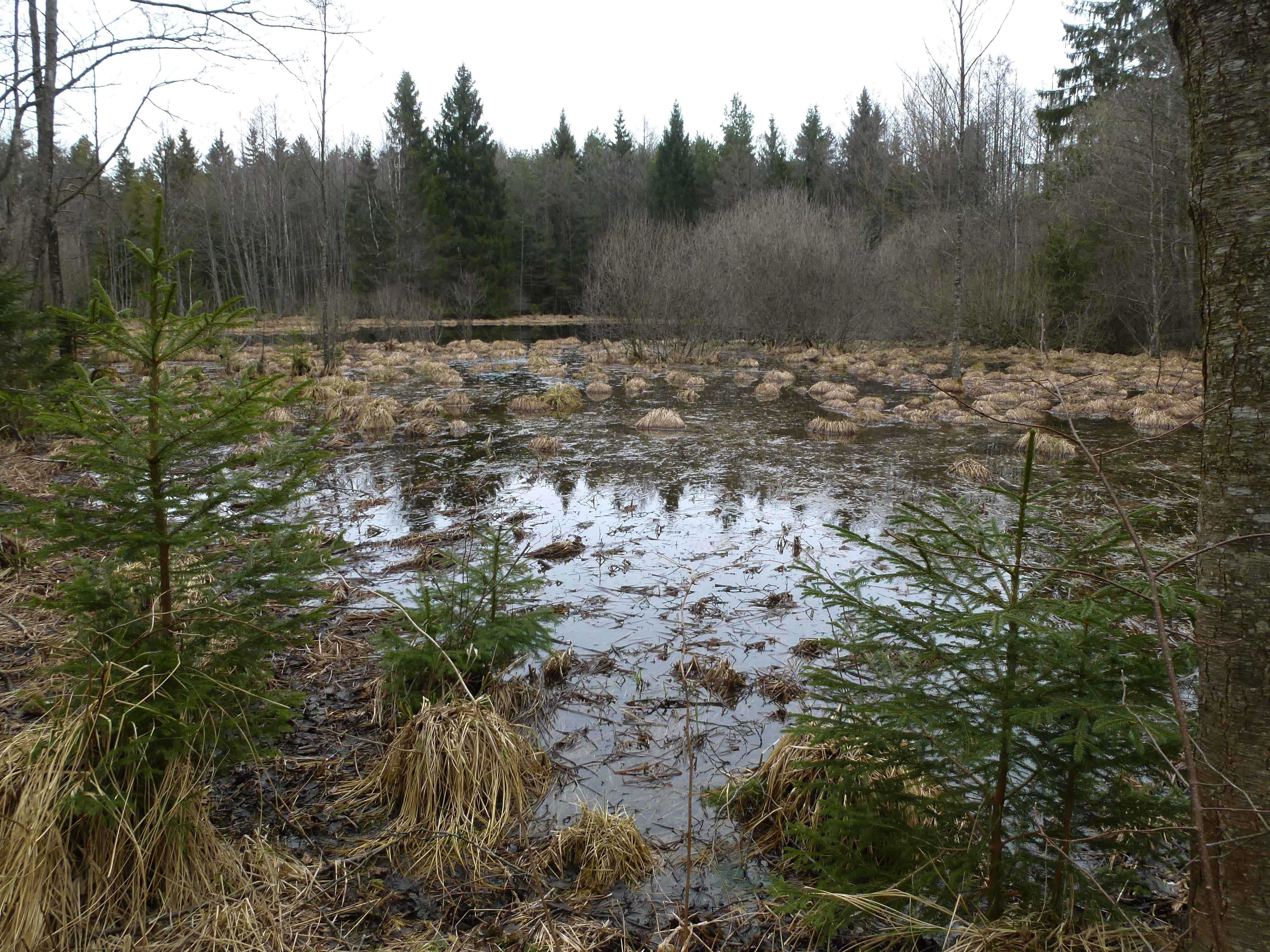 Toteisloch, ca. 450m nördlich von Abtsried (Sandbergweiher), der Gemeinde Dießen am Ammersee zugeordnet. Aufnahmerichtung: von Süden nach Norden